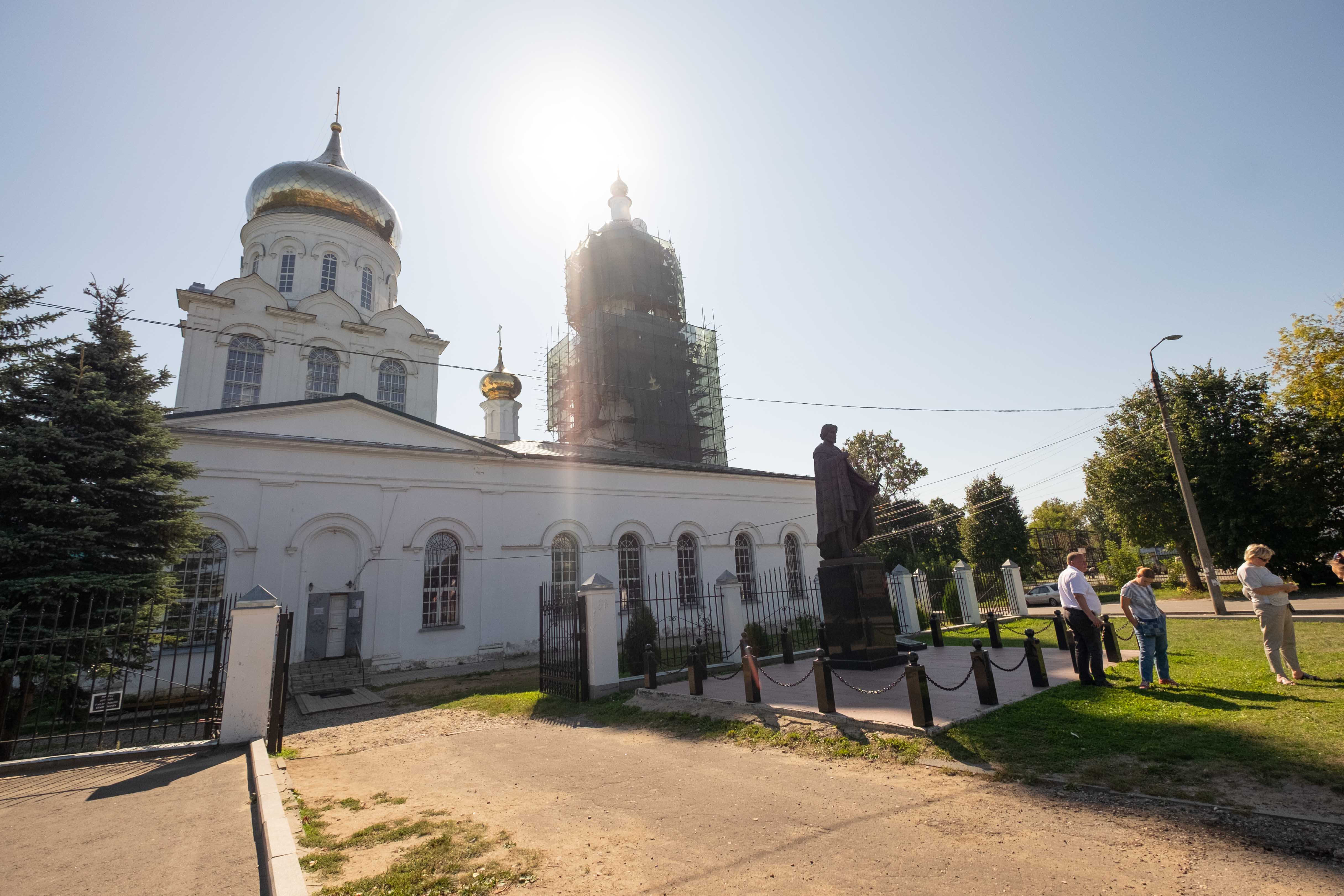 Собор